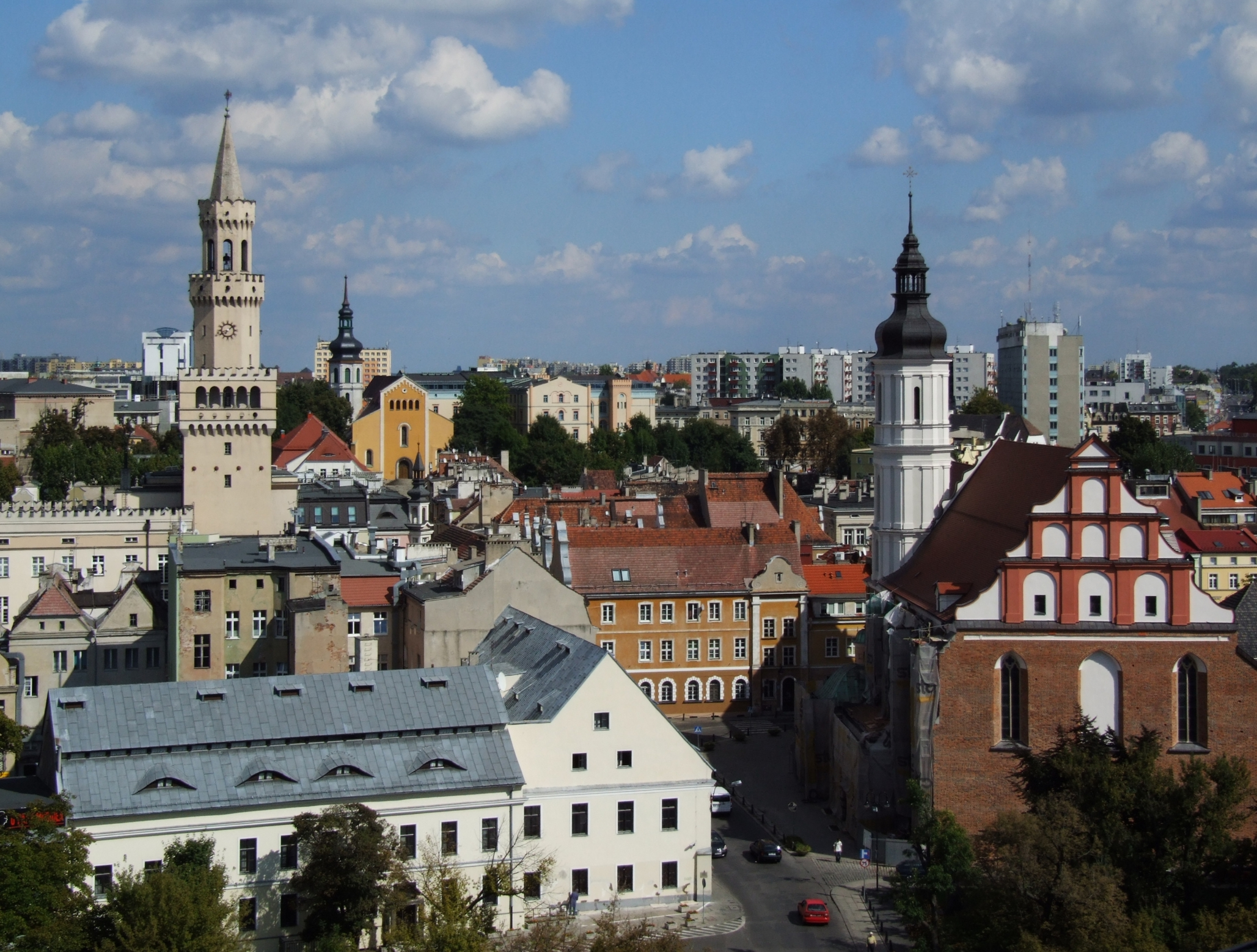 Stare Miasto w Opolu